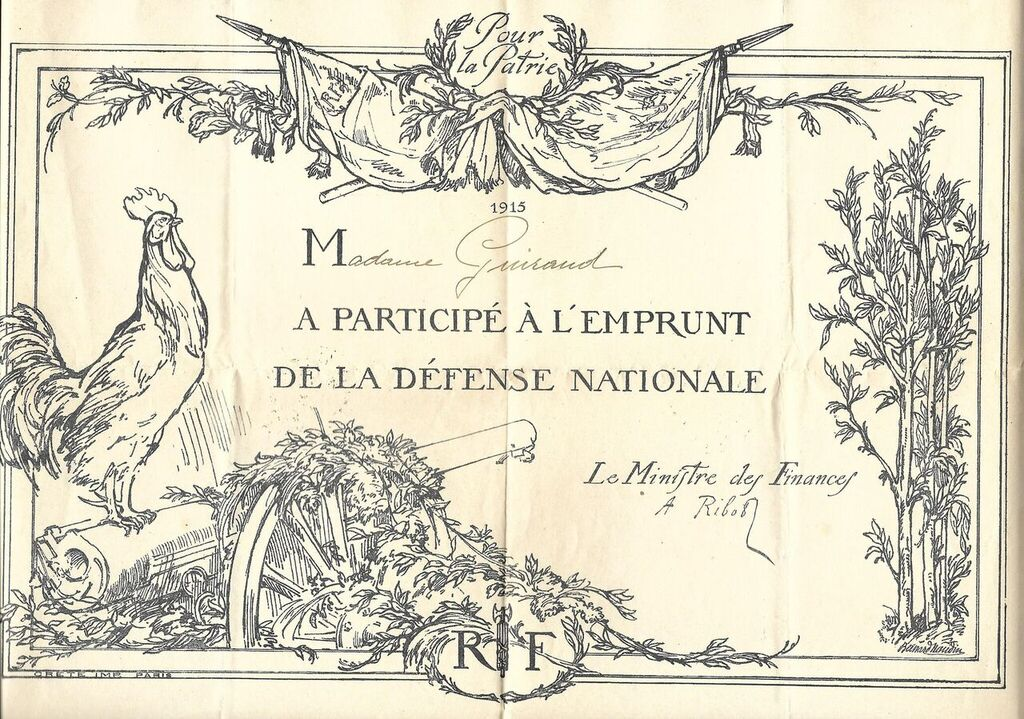 Attestation de participation au premier emprunt de la défense nationale 1915, ministre des finances A Ribot